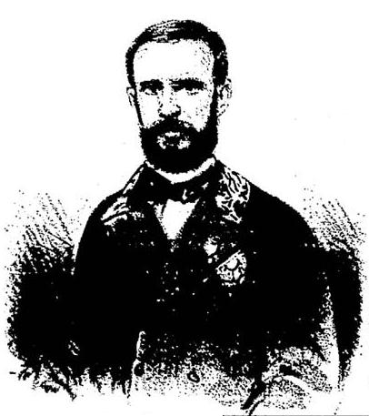 José Vieira Couto de Magalhães, então Presidente da província de Mato Grosso.